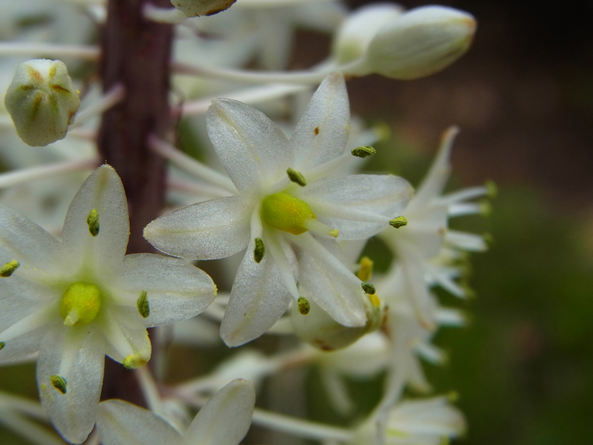 Meerzwiebel (Drimia maritima), bei Sant Tomás (Menorca)